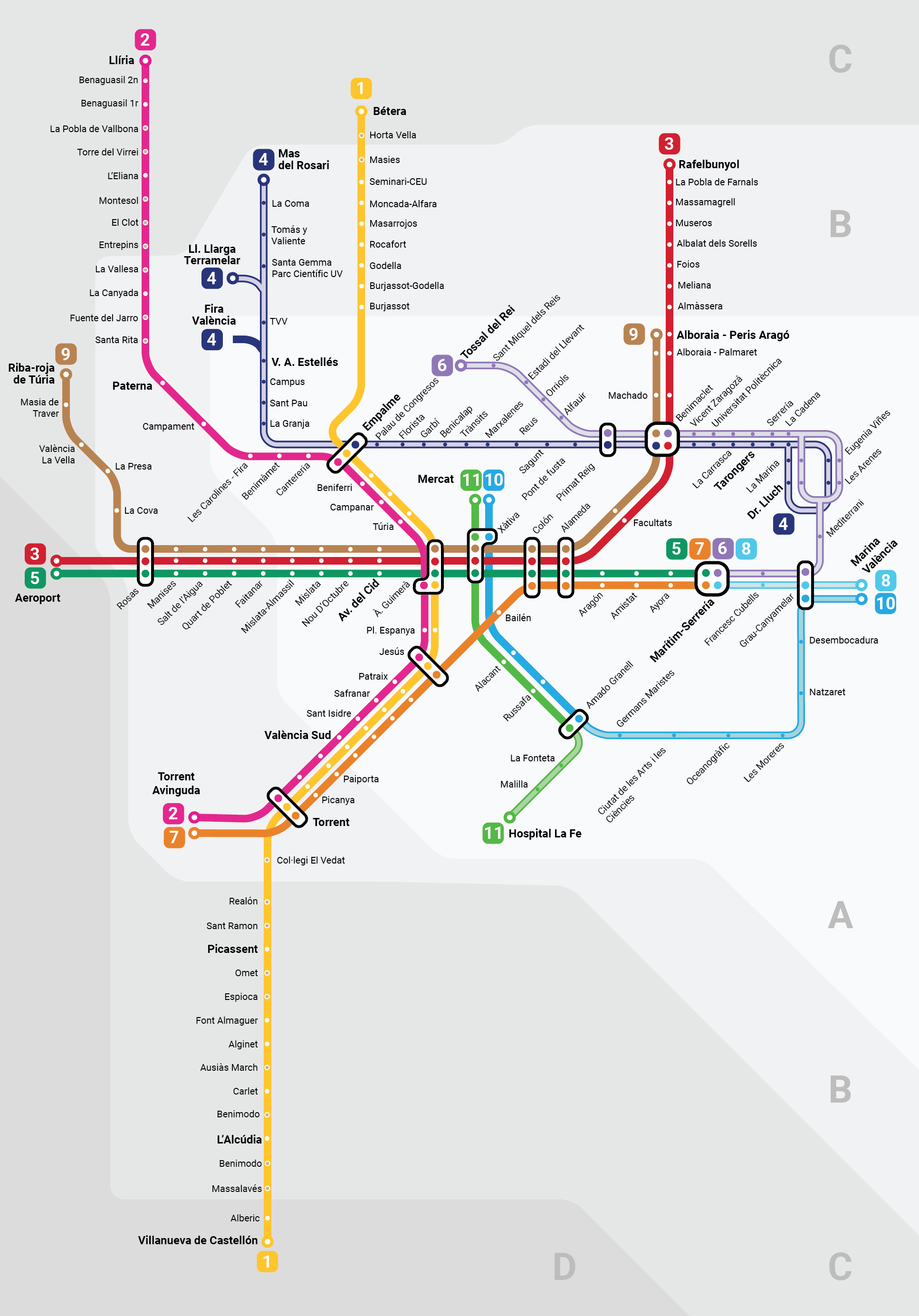 Simulación del plano de metrovalencia con los proyectos de ampliación.